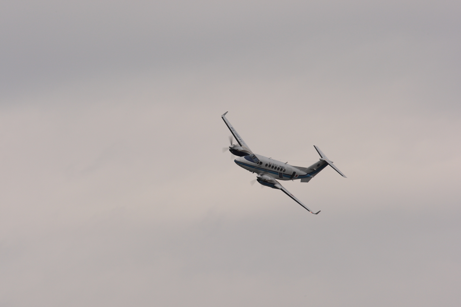 新潟空港で撮影された、海上保安庁第九管区海上保安本部のBeechcraft B350